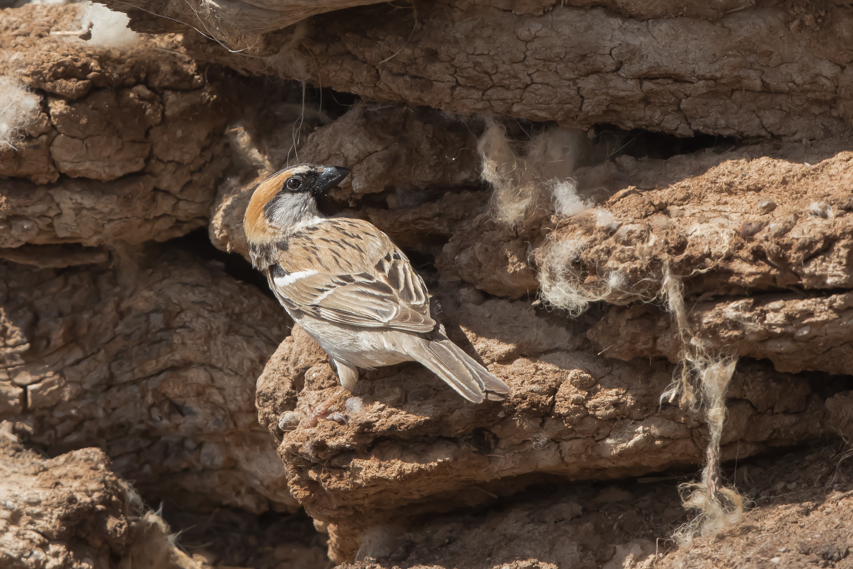 Saxaul Sparrow Male (Passer ammodendri) - Загийн боршувуу